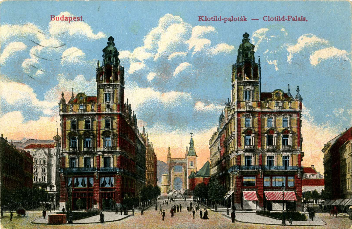 Budapesti Klotild-paloták régi képeslapon